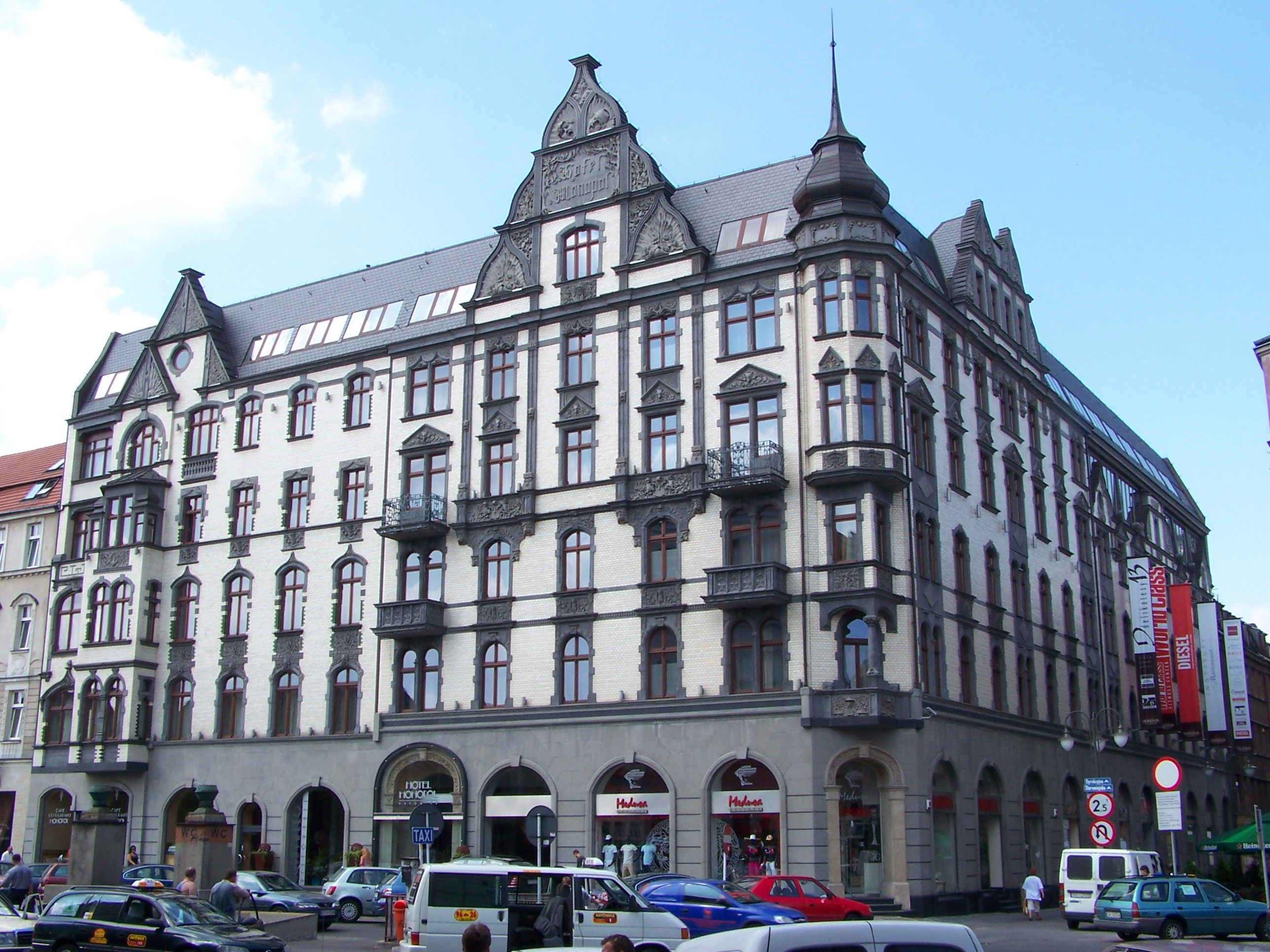 Zabytkowy budynek Hotelu Monopol przy ul. Dworcowej w Katowicach. (zabytek nr rejestr. A/1526/93)